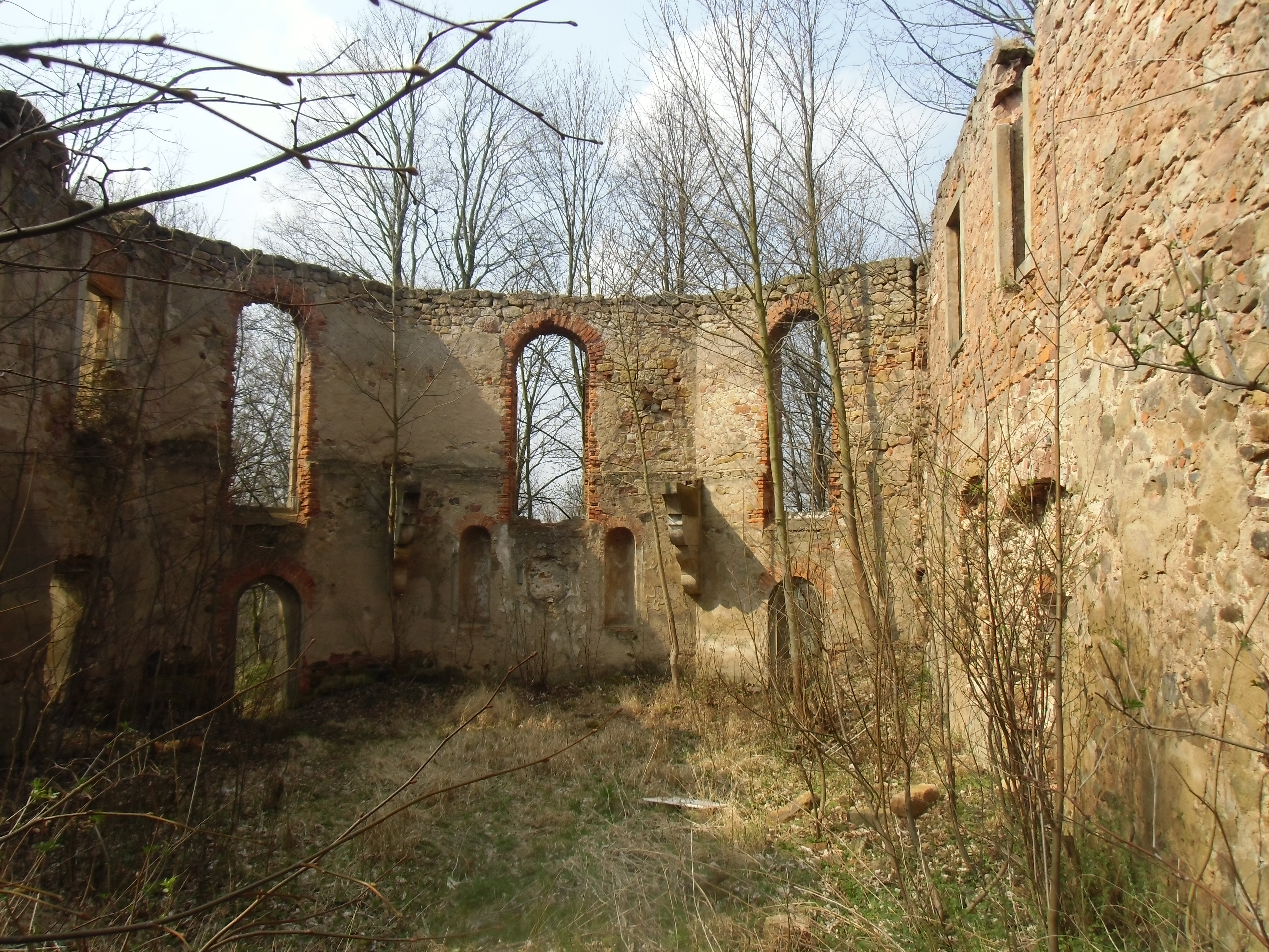 Kondratów - ruina pałacu (zamku), XVI/XVII